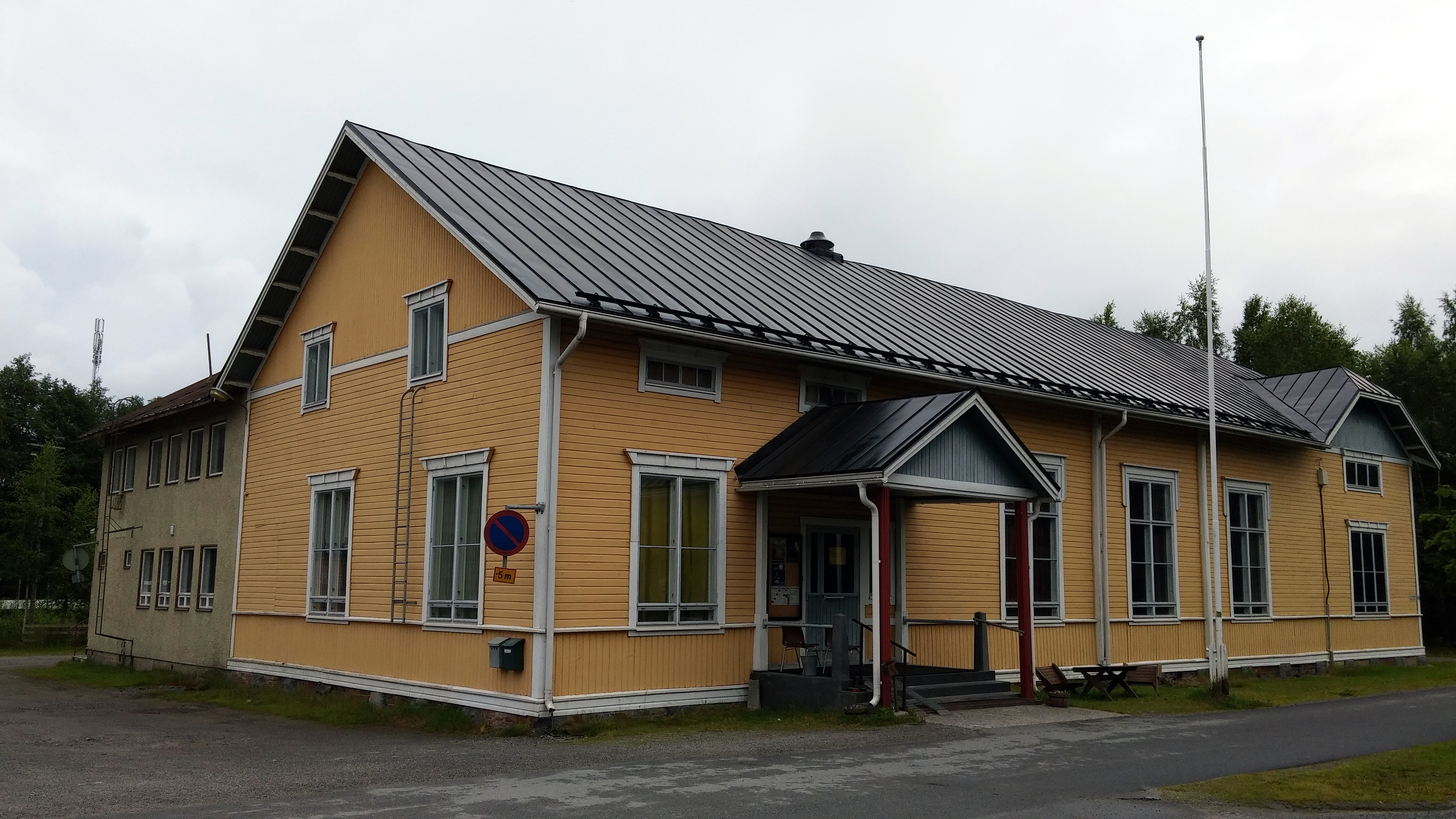 Ykspihlajan työväentalo Kokkolassa, Suomessa.